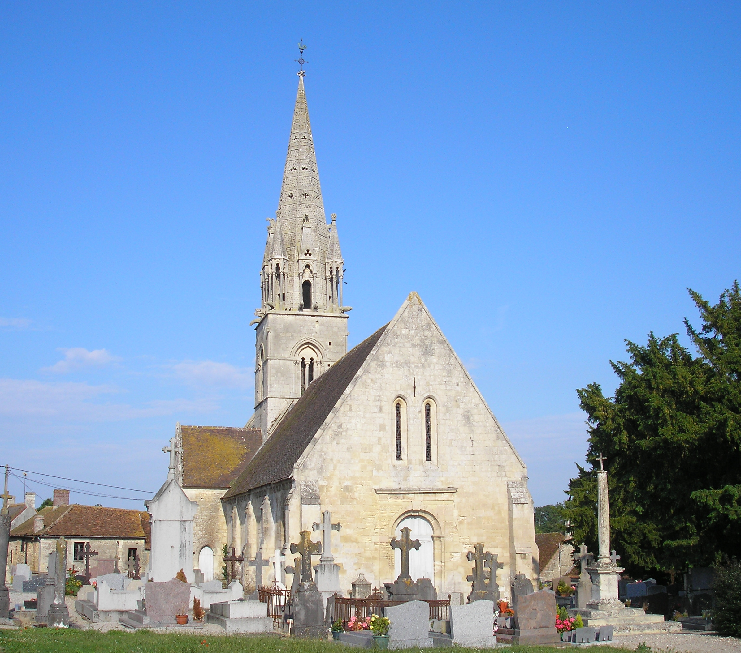 Maizières (Normandie, France). L'église Saint-Pierre.